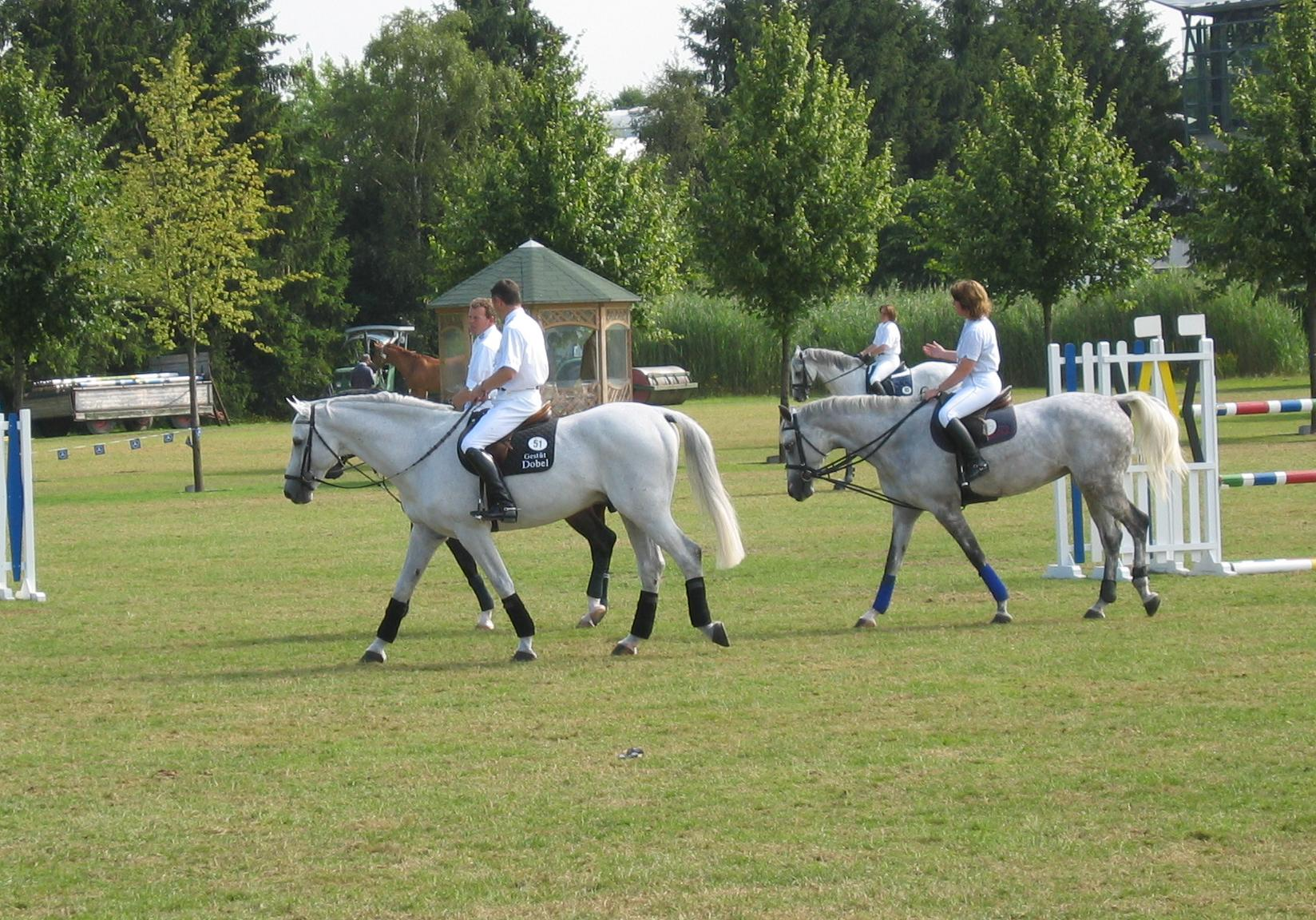 Otto Becker auf Dobel's Cento (Holsteiner) - dahinter Lars Nieberg gefolgt von Helena Weinberg.